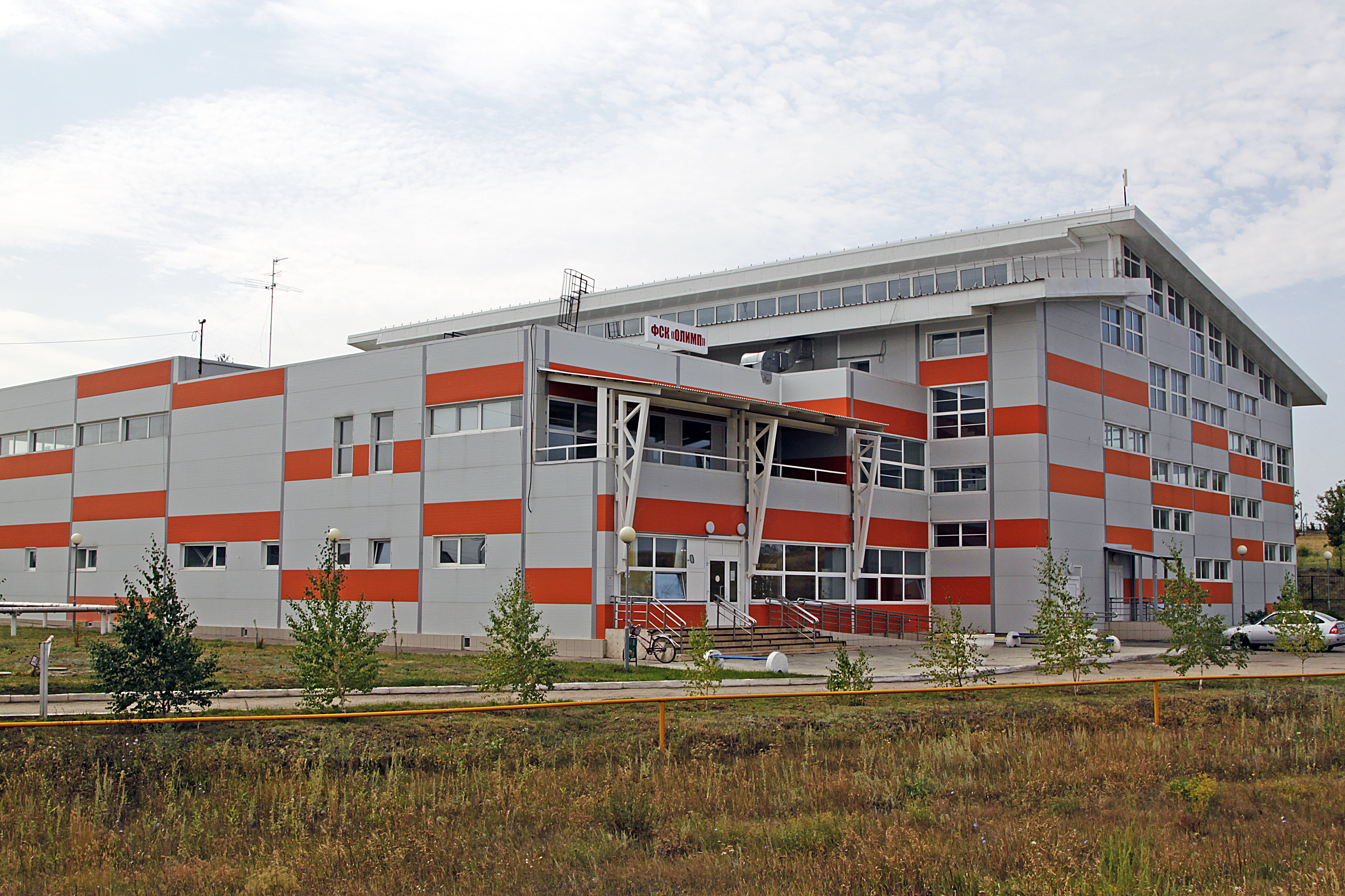 ФИЗКУЛЬТУРНО - СПОРТИВНЫЙ КОМПЛЕКС "ОЛИМП" МУНИЦИПАЛЬНОГО РАЙОНА АЛЕКСЕЕВСКИЙ САМАРСКОЙ ОБЛАСТИ